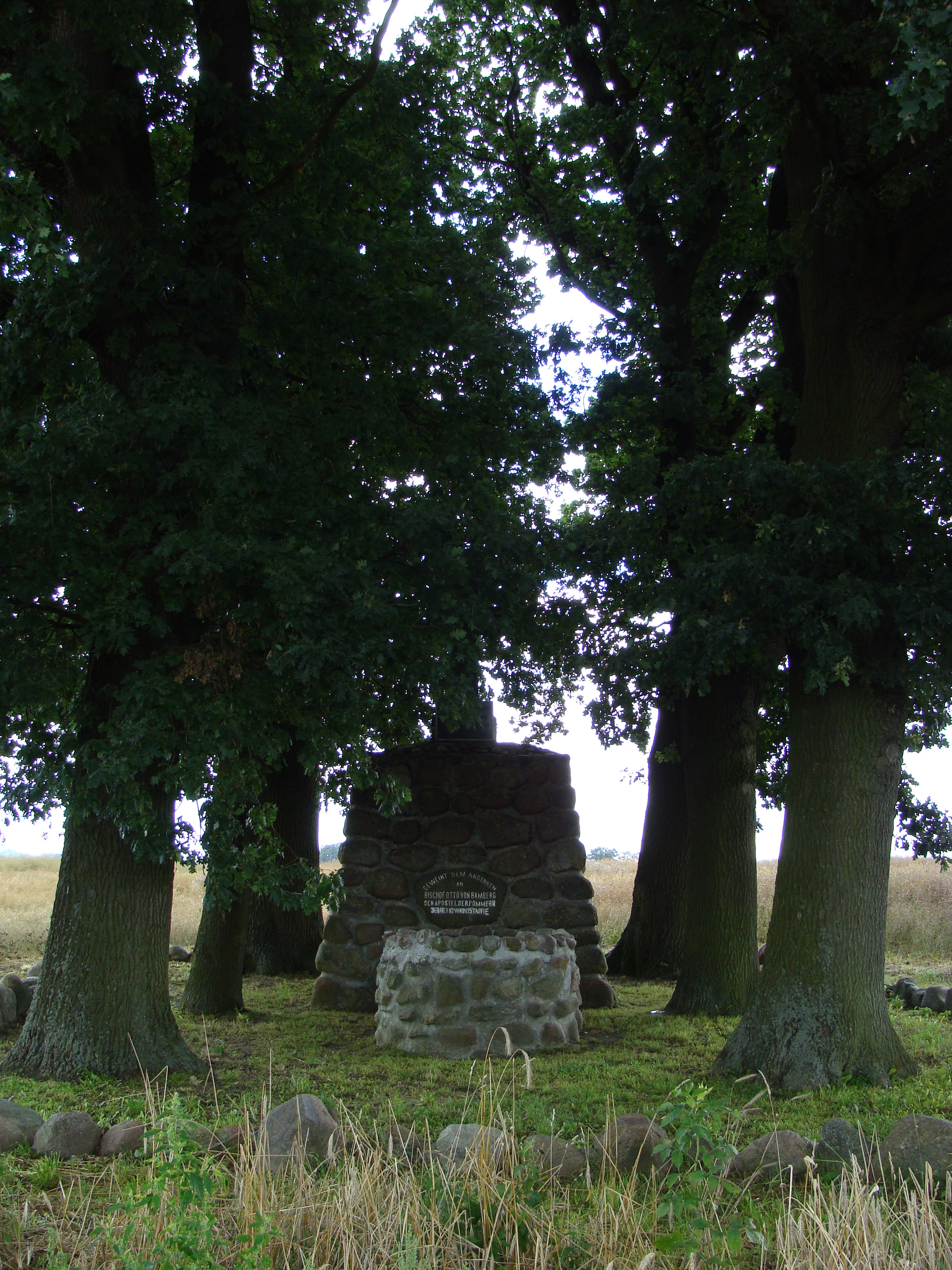 Cerkwica - studnia św. Ottona z Bambergu, 1912 (studnia w jednym z miejsc symbolicznego, tzw. zbiorowego chrztu ludności Pomorza Zachodniego, przeprowadzonego przez biskupa Ottona z Bambergu)